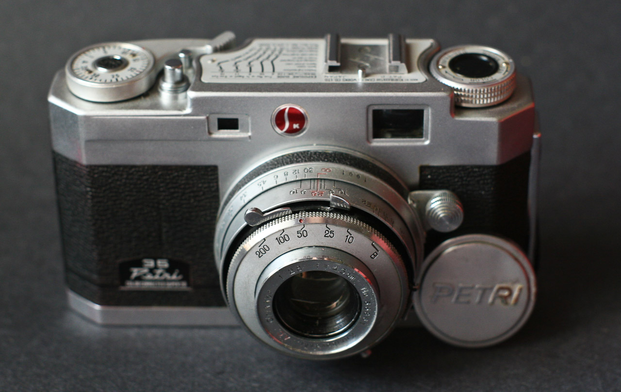 w/45mm f/2.8 lens